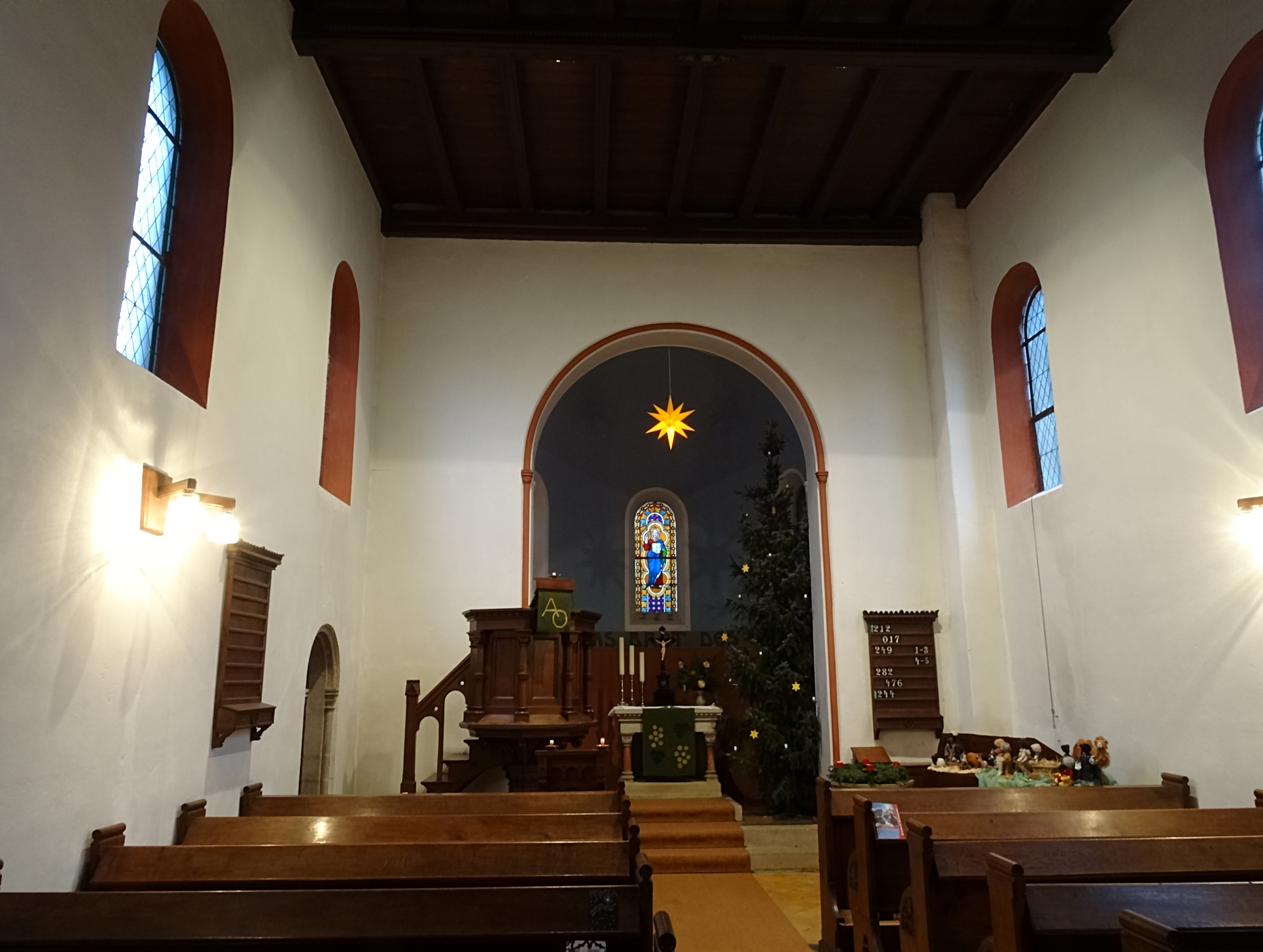 Kapelle der altlutherischen Gemeinde in Heldrungen von 1884, Altarraum